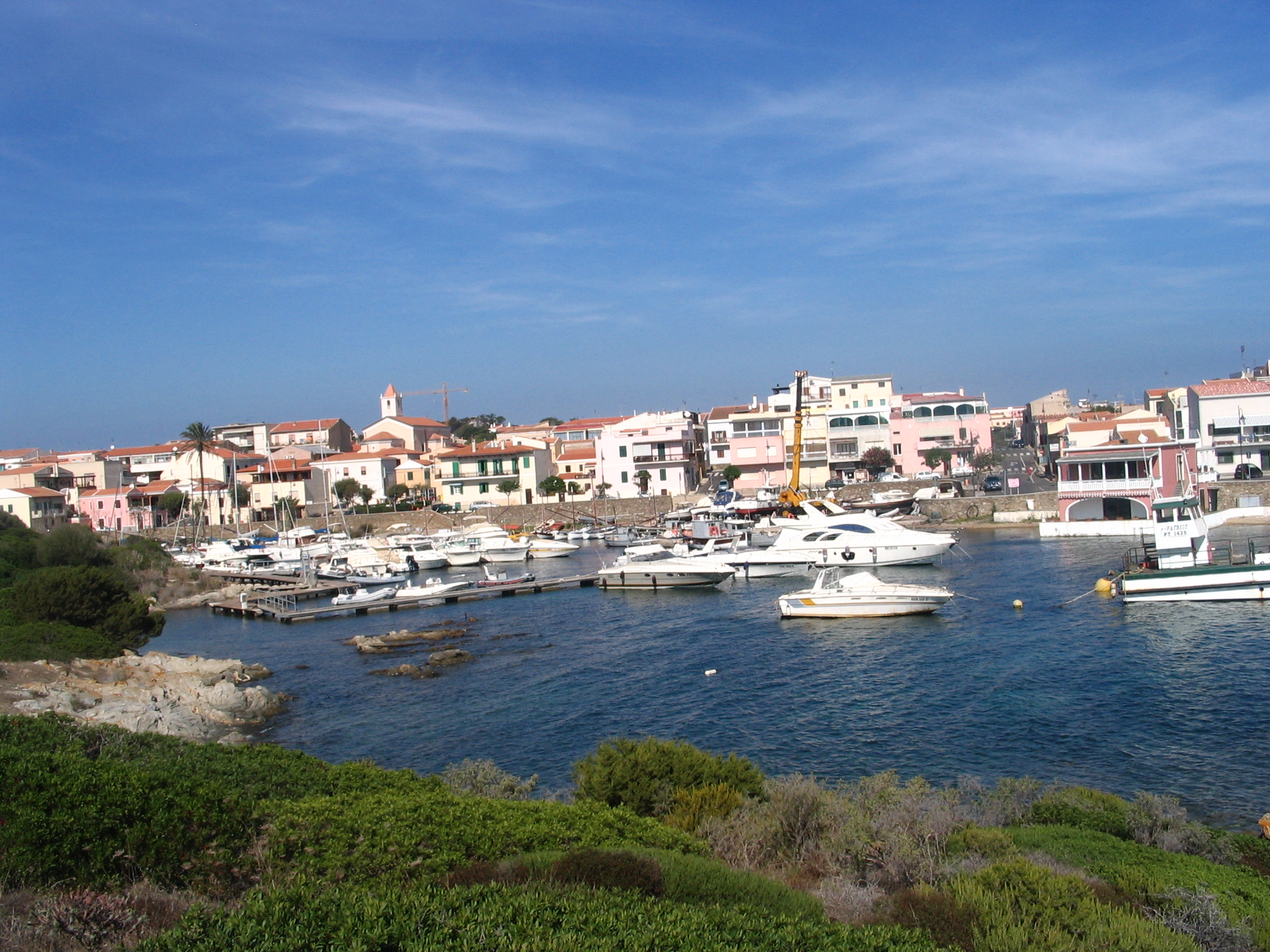 Stintino